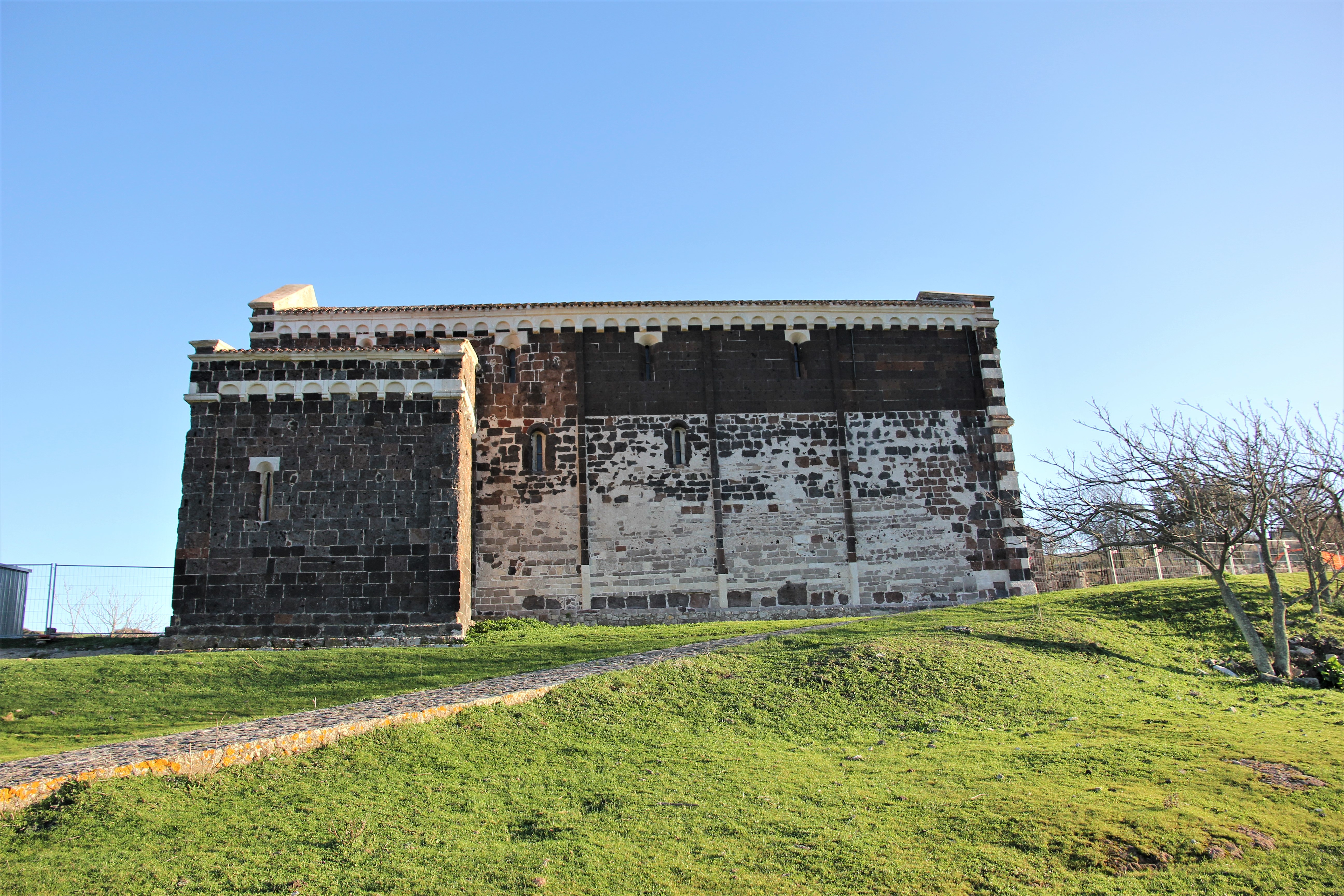 Bulzi, chiesa di San Pietro del Crocifisso